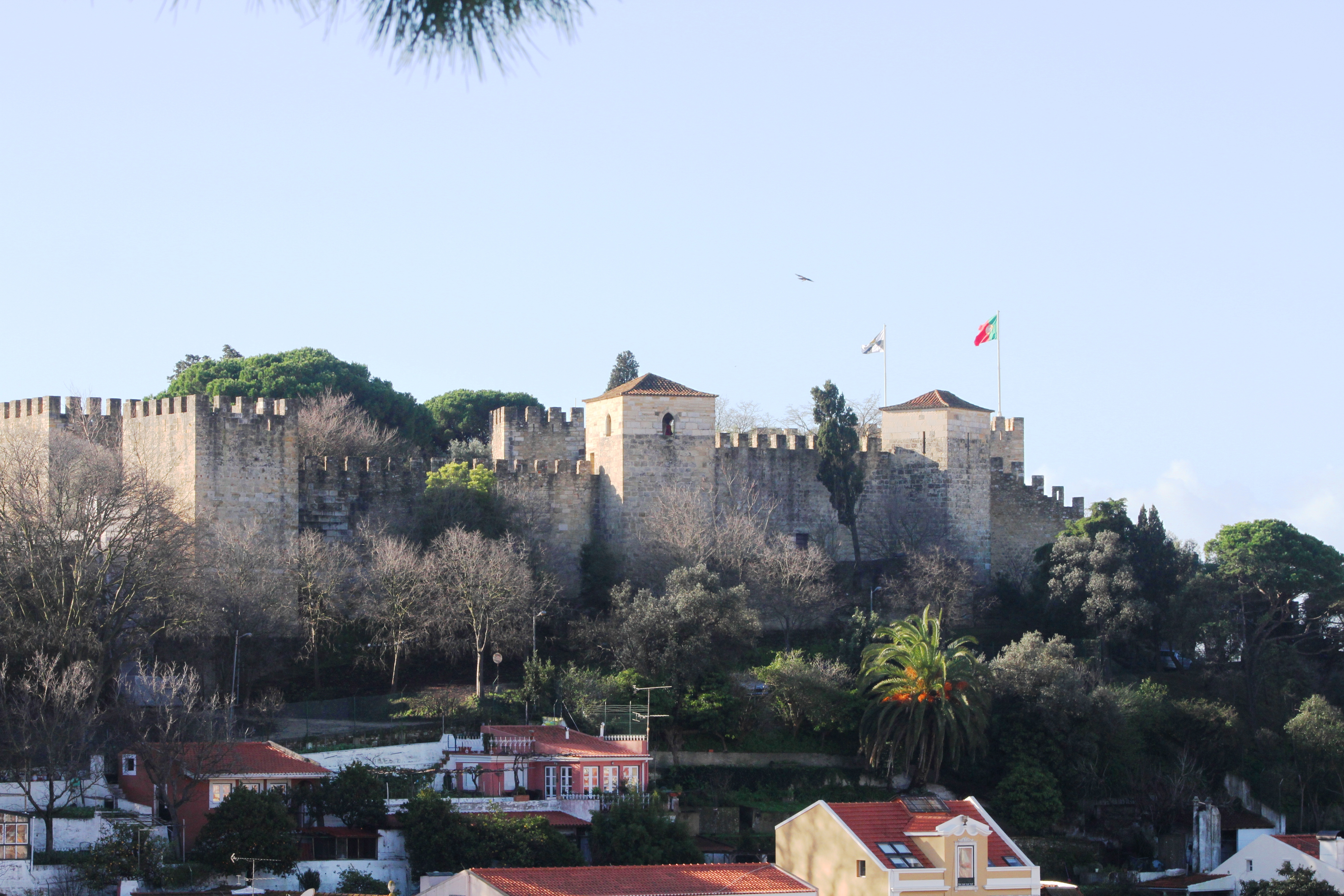 Miradouro da Graça - Castelo de São Jorge